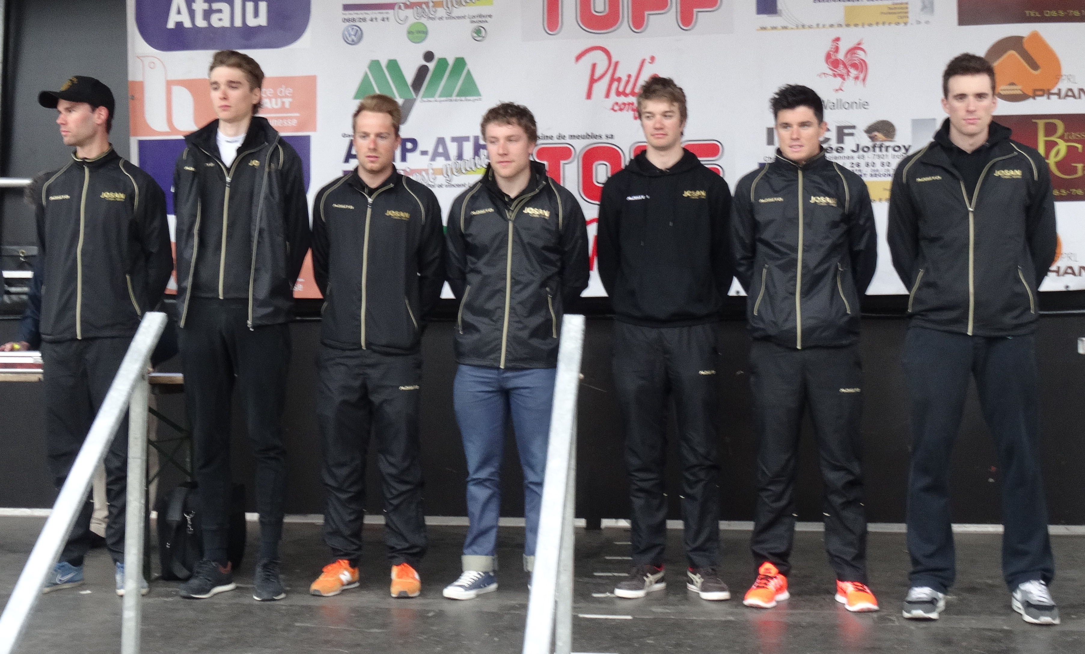 Triptyque des Monts et Châteaux 2014, étape 1, 4 avril 2014, départ d'Antoing. Depicted people: Ian Vansumere, Julien Van Den Brande, Niels De Rooze, Niels Reynvoet, Lars Haverals, Angelo De Clercq and Sean Van de Waeter Depicted team: Josan-To Win The creation of these files was made possible thanks to the organizers of the Triptyque des Monts et Châteaux 2014 English | français | +/−